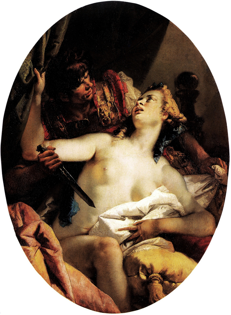 Tarquinio and Lucrezia